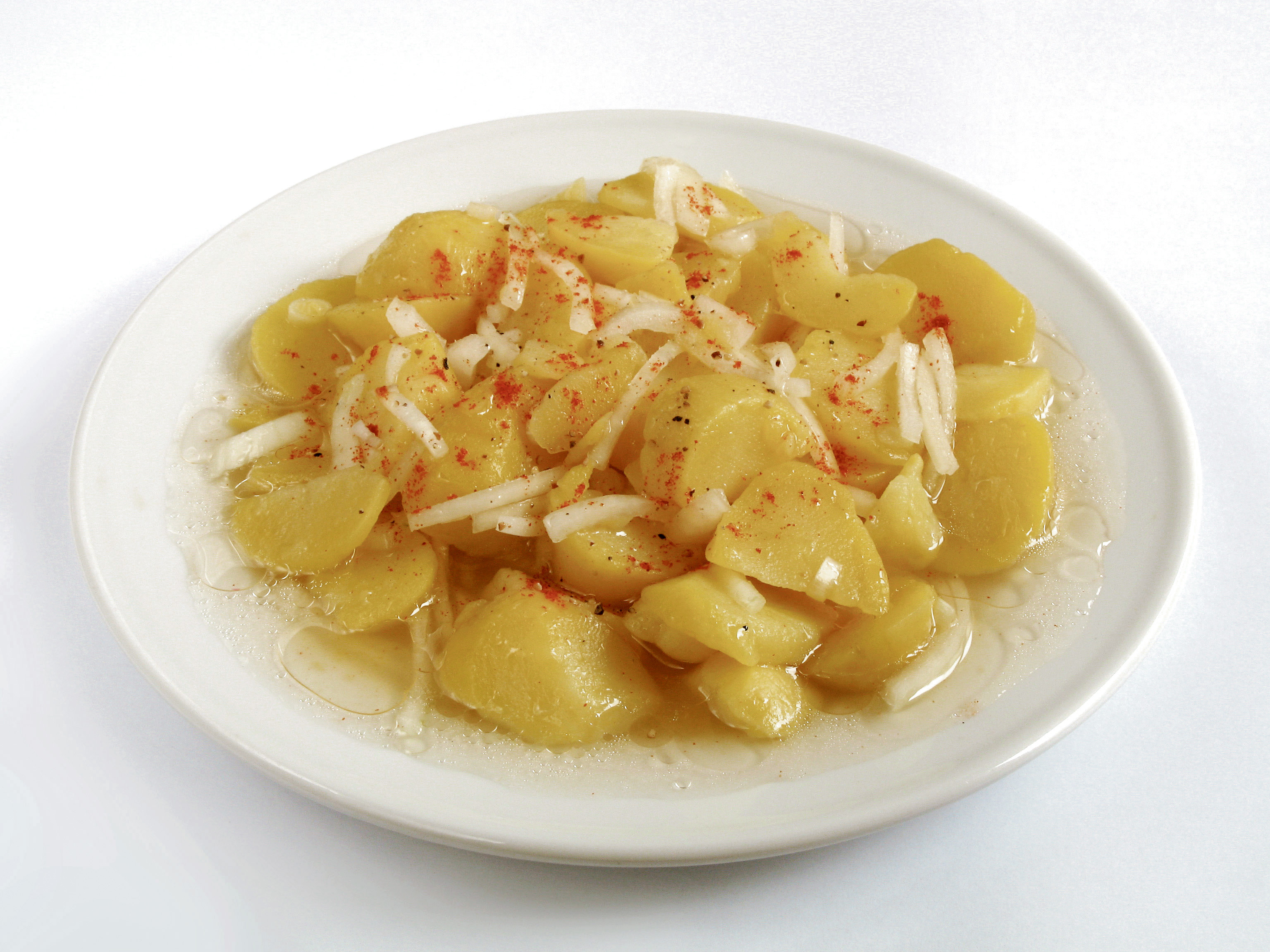 Kartoffelsalat, in Österreich auch Erdäpfelsalat